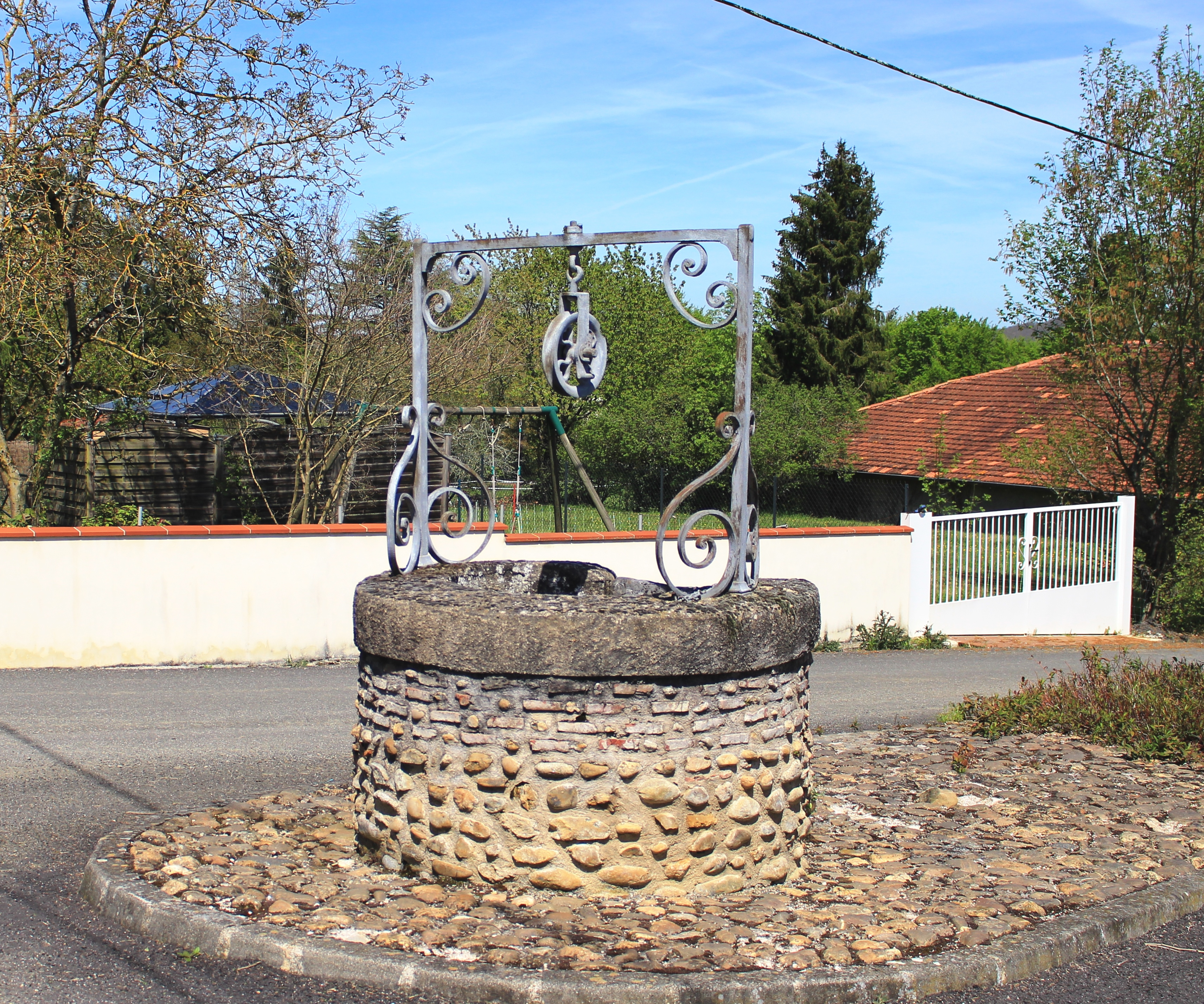 Puits de Soréac (Hautes-Pyrénées)